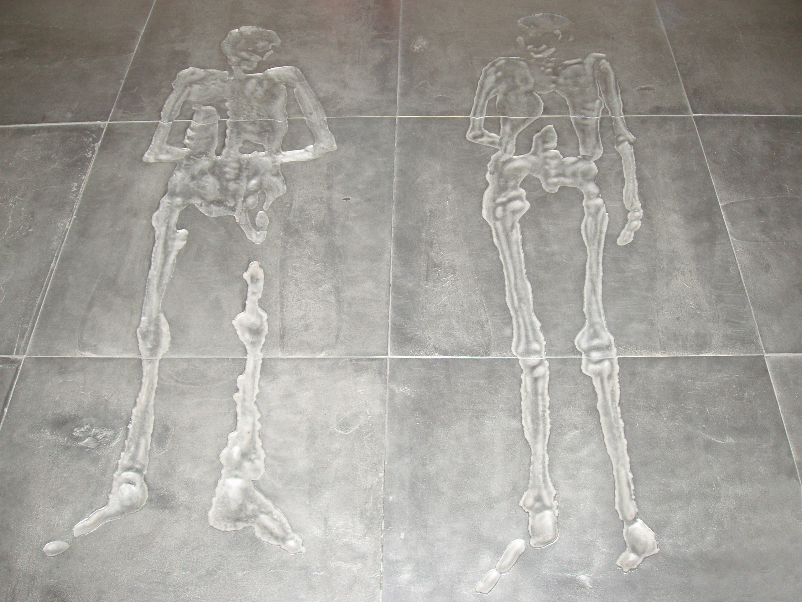 Teruel. Amantes. Huella momias